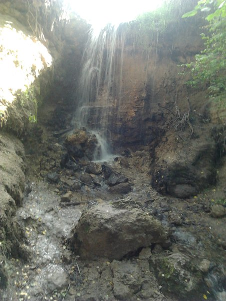 Калужская Ниагара